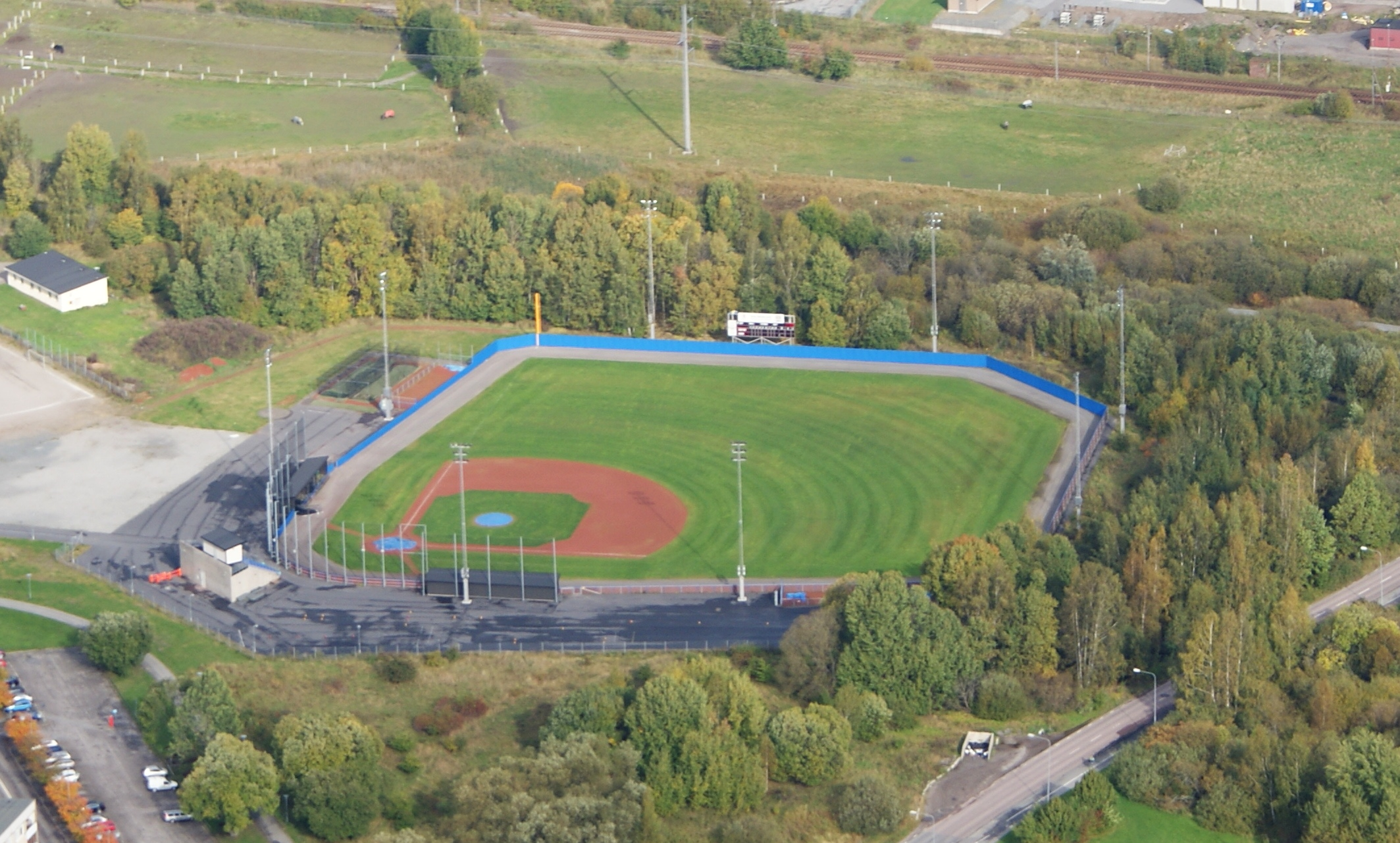 Nya örvallen.